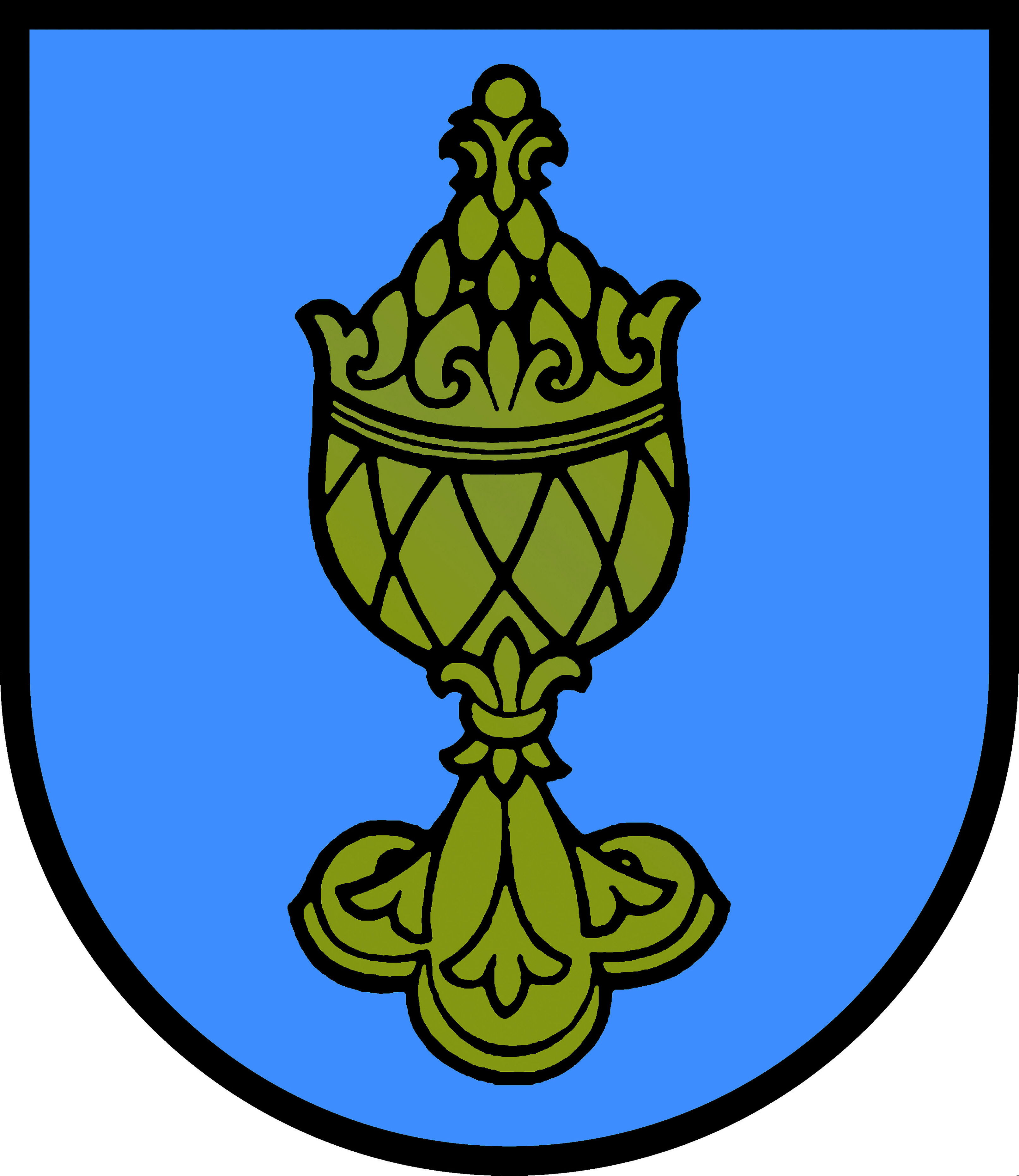 Wappen der ehemaligen Gemeinde Sankt Oswald ob Eibiswald, Steiermark